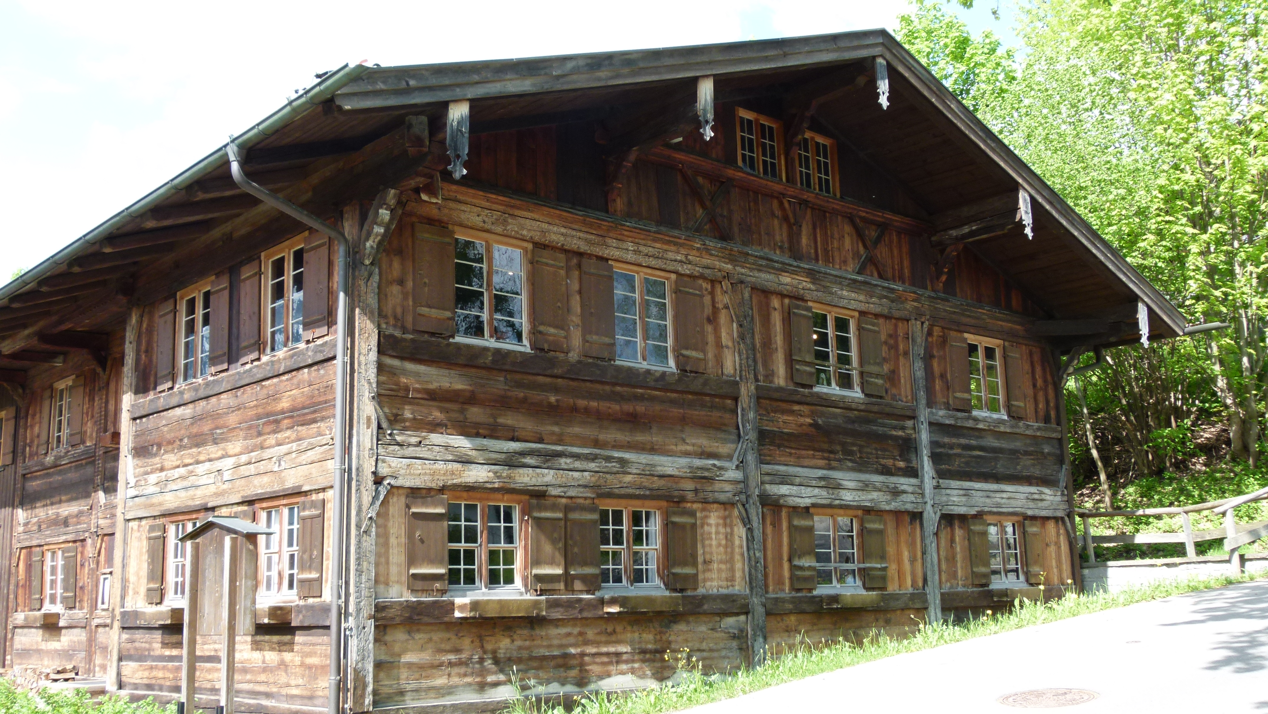 Heimathaus in Pfronten-Berg, Kirchsteige 1